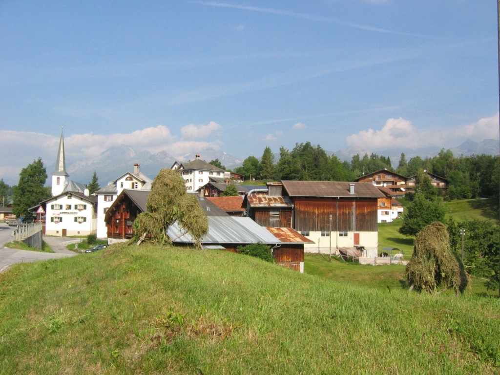 Flond